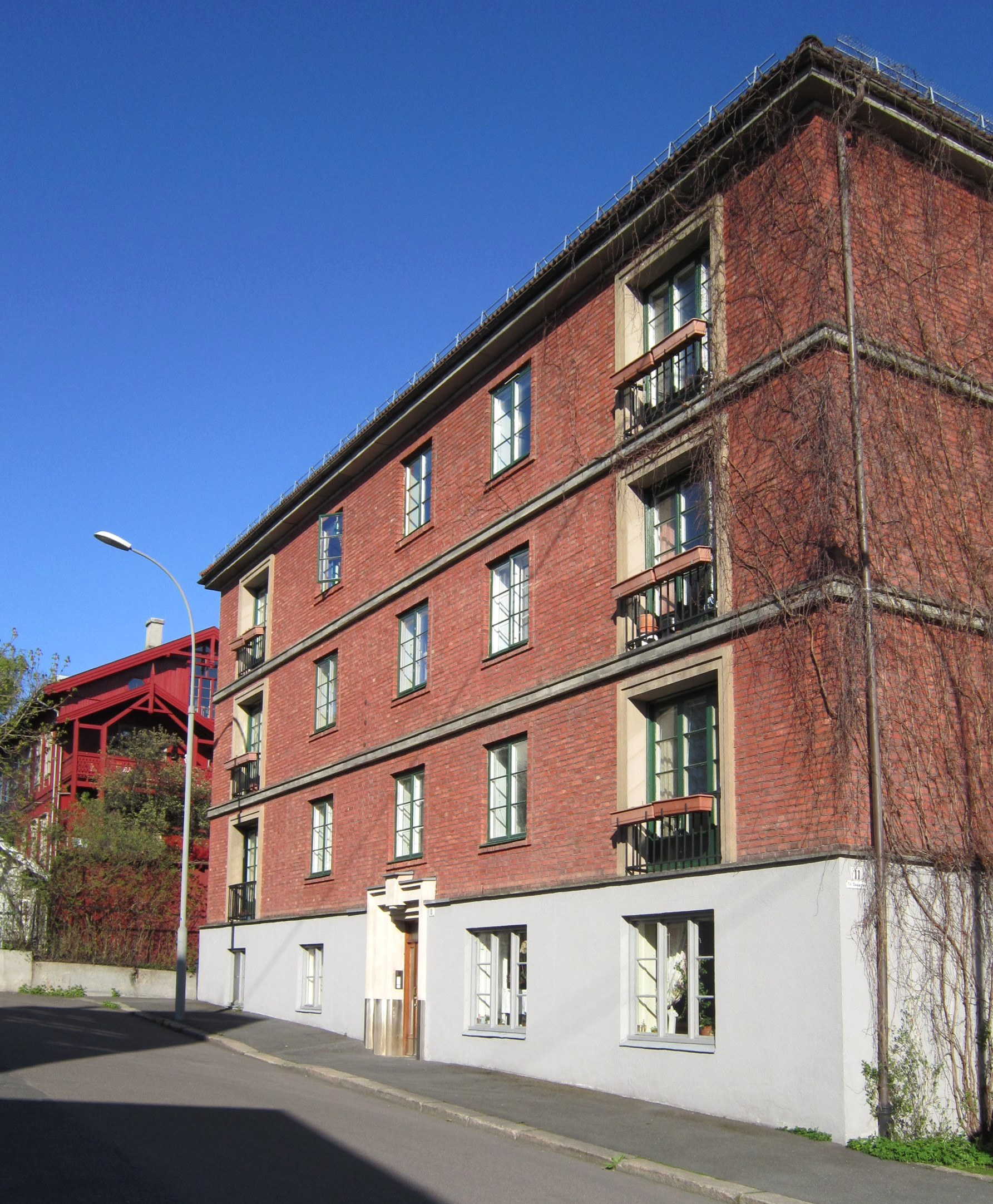 Daas gate 11 i Oslo. Arkitekt: Nils Holter (1928).